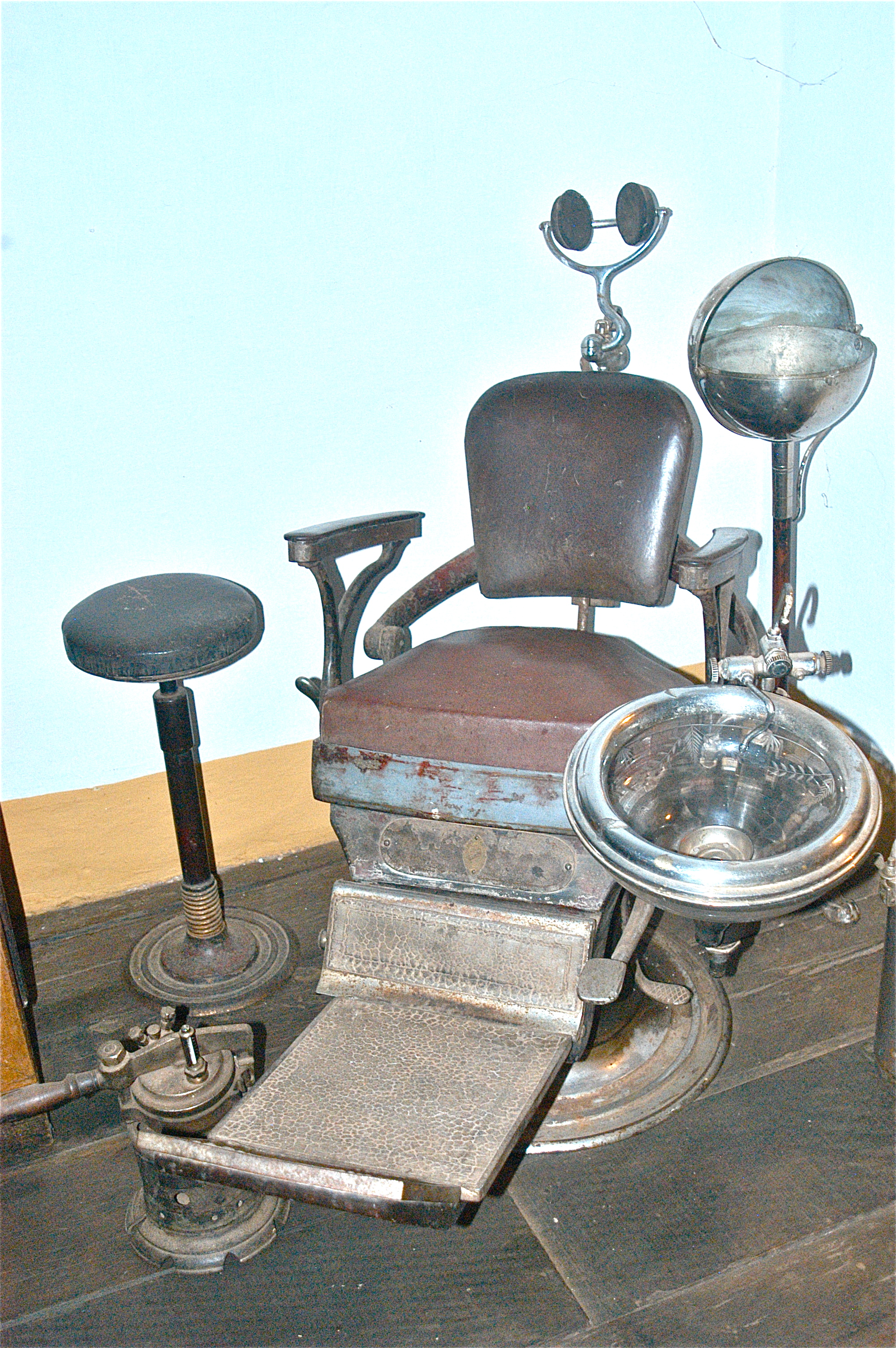 consultório dentário antigo exposto no museu da familia pompeu, em pirenopolis, goias, brasil